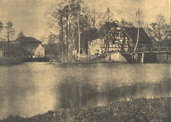 Die Wahrenbrücker Elstermühle um 1912